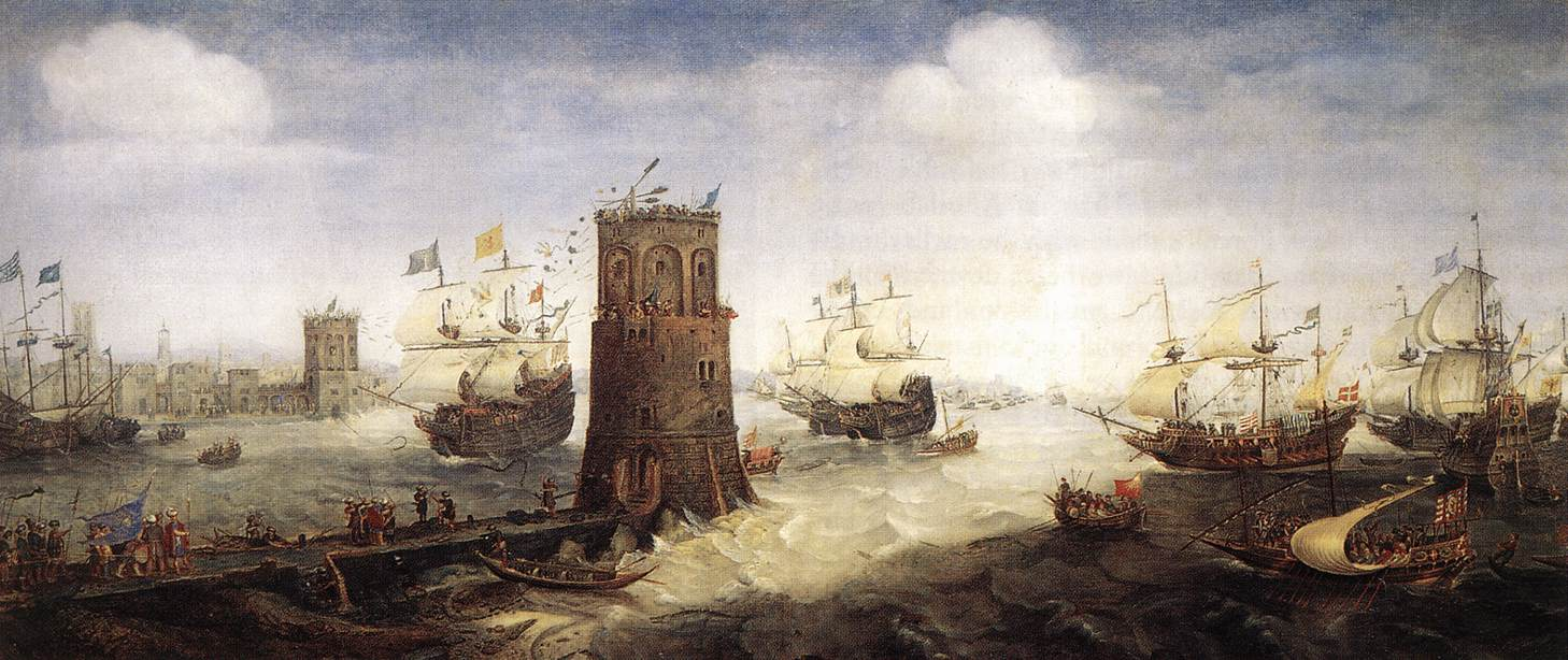 De verovering van Damiate. Dit schilderij werd gemaakt voor boven de schoorsteenmantel van de krijgsraadkamer in het gebouw van de Haarlemse Cluveniers (schutters).